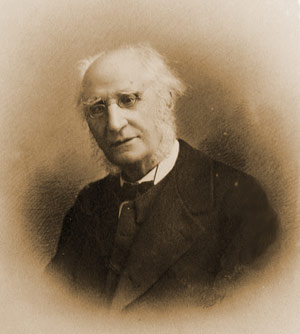 ollivier